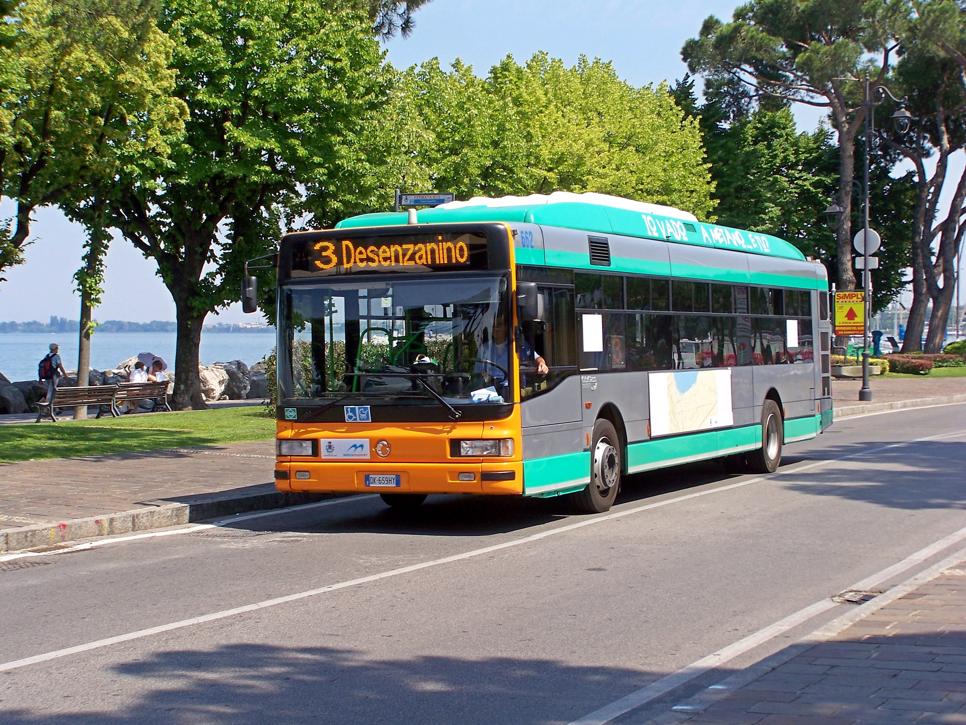 L'Irisbus CityClass 662 di Brescia Trasporti ritratto in Piazza Cappelletti mentre espleta servizio sulla linea 3 di Desenzano del Garda in direzione Desenzanino